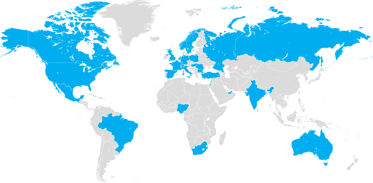 Kolorem niebieskim oznaczono zasięg działania Senetic na rok 2019.